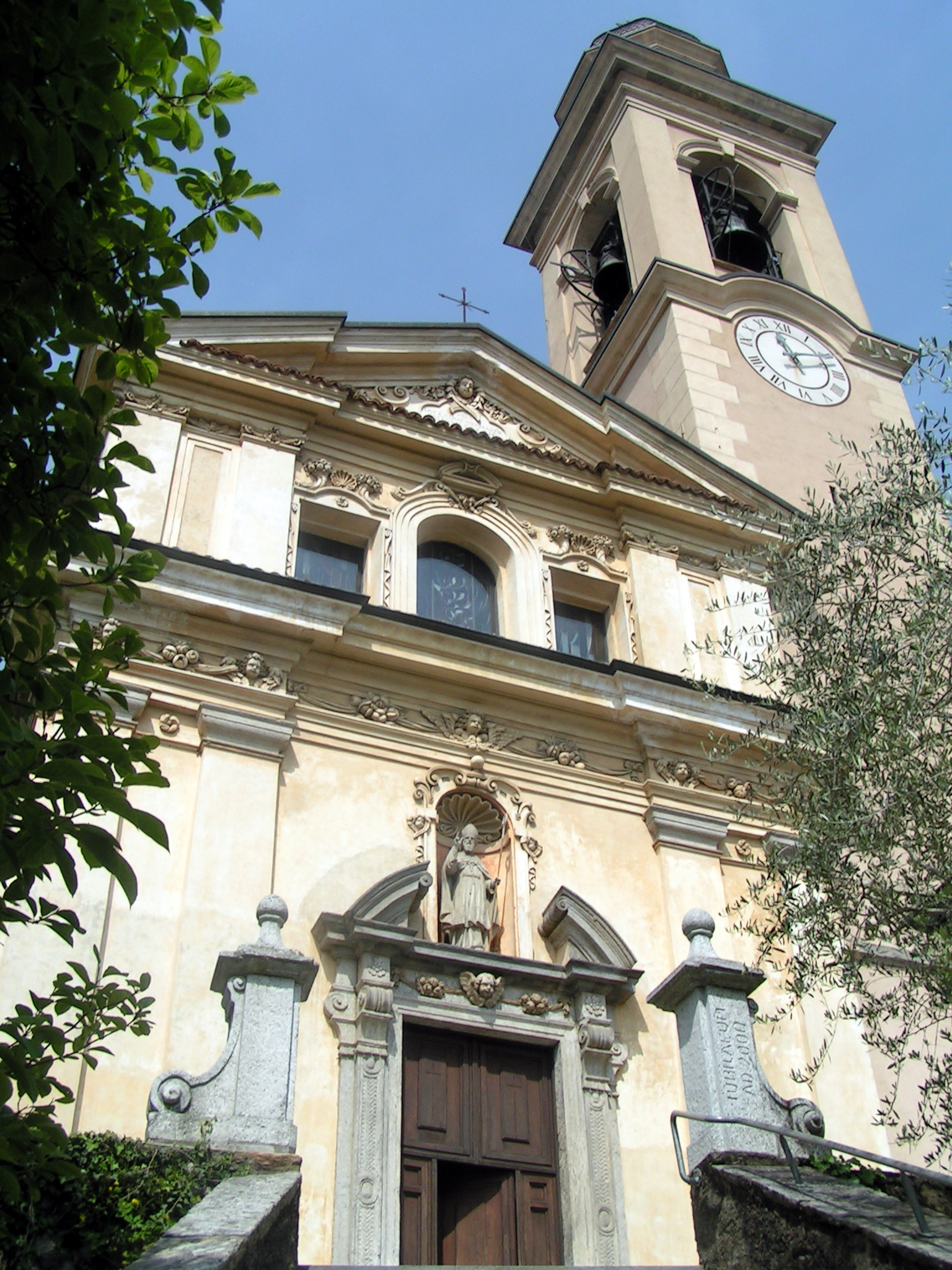 Chiesa di San Martino (Pura)